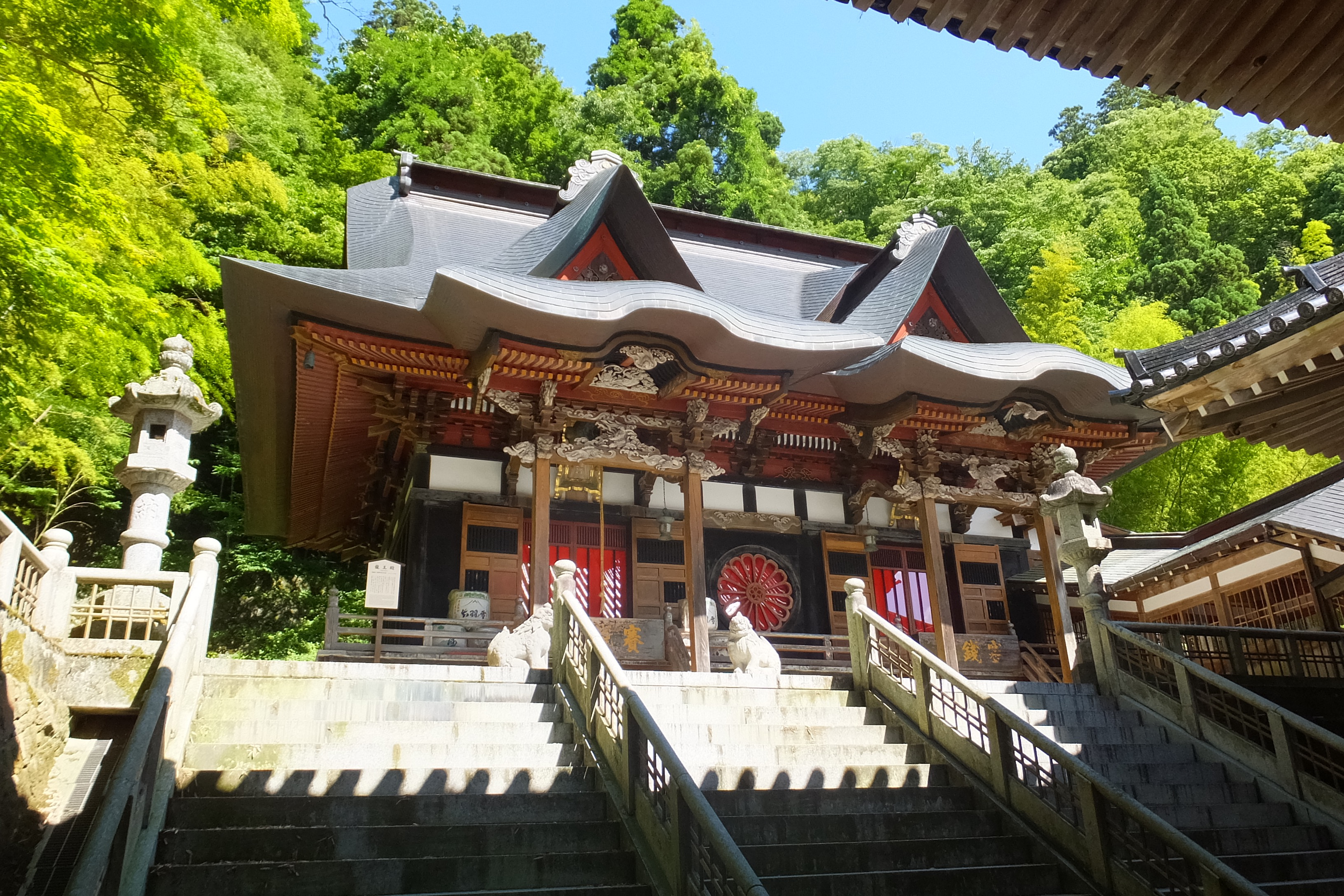 tenple